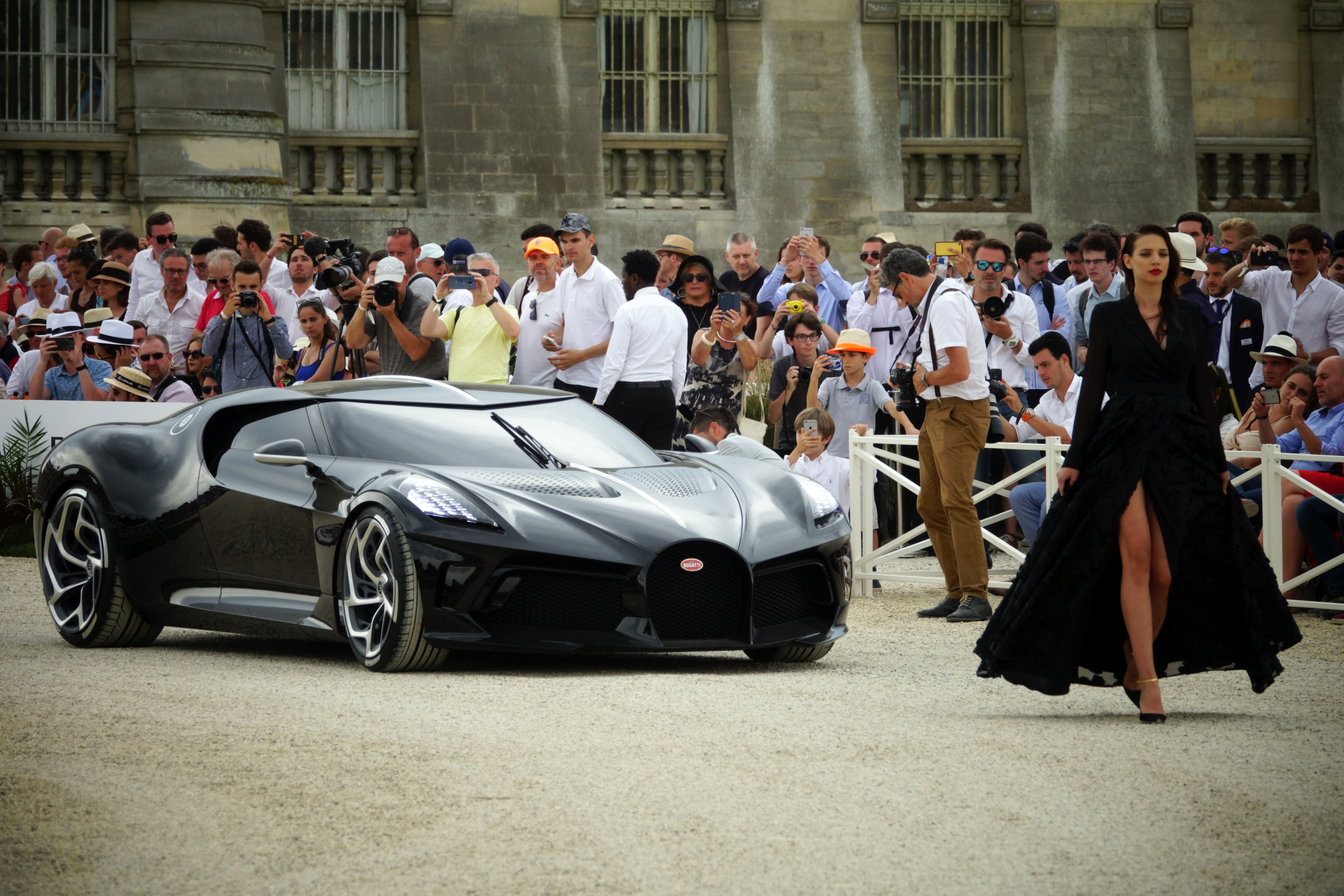 Bugatti La Voiture Noire au Chantilly Arts & Elegance Richard Mille 2019